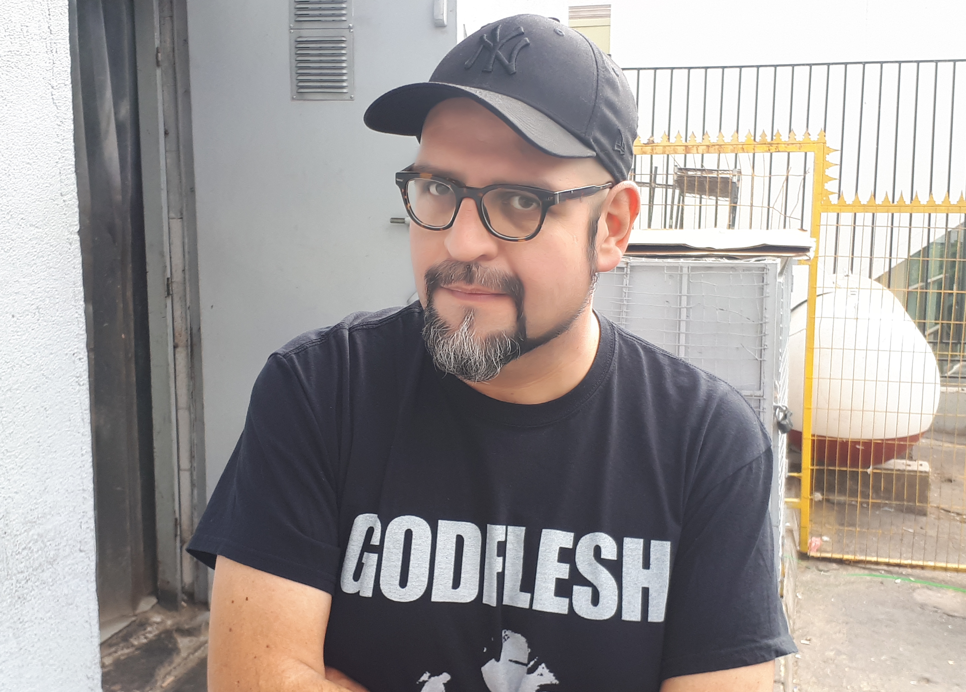 Nueva foto de la última novela del escritor Patricio Jara.